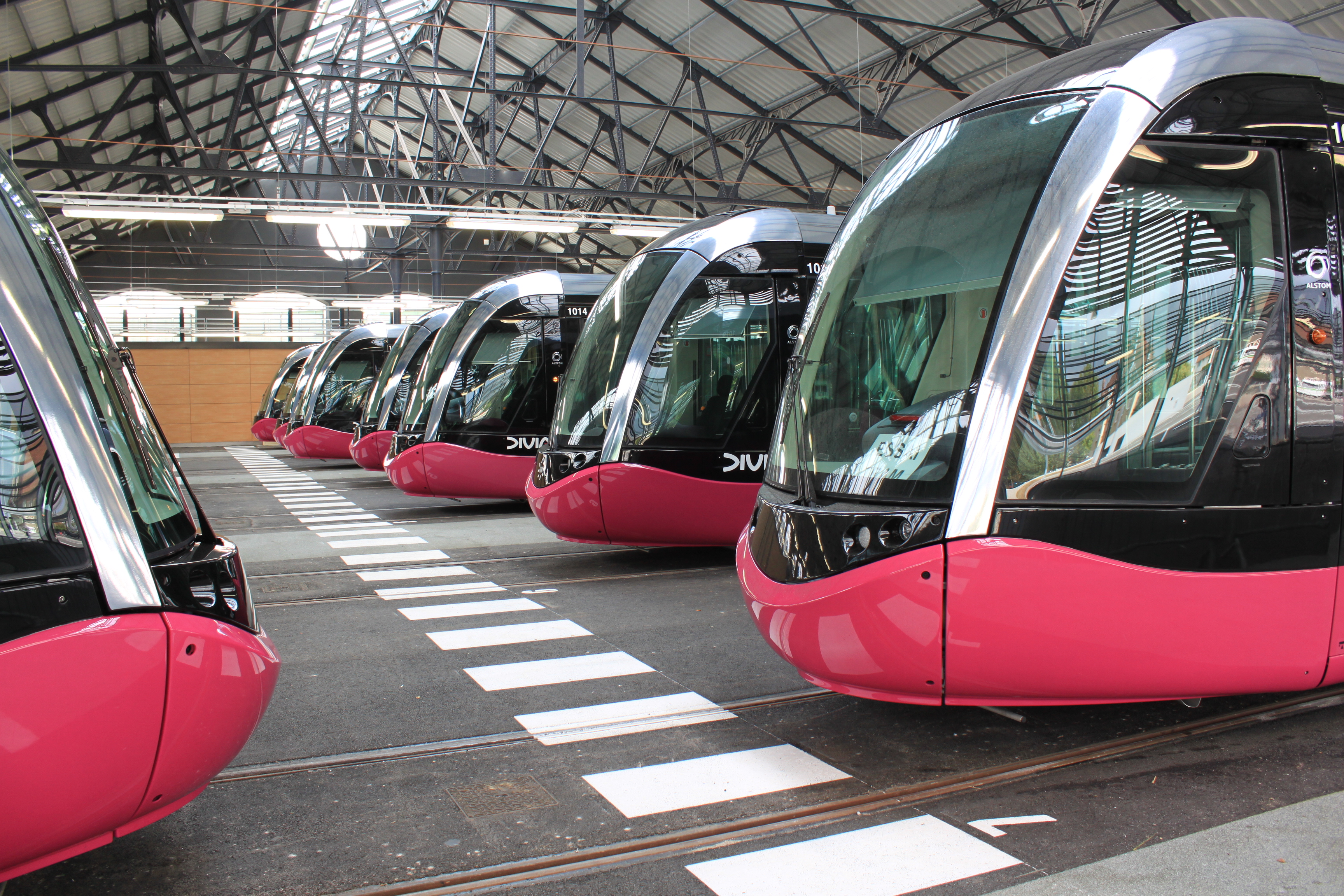 Ateliers du tramway, Côte-d'Or, Bourgogne, France